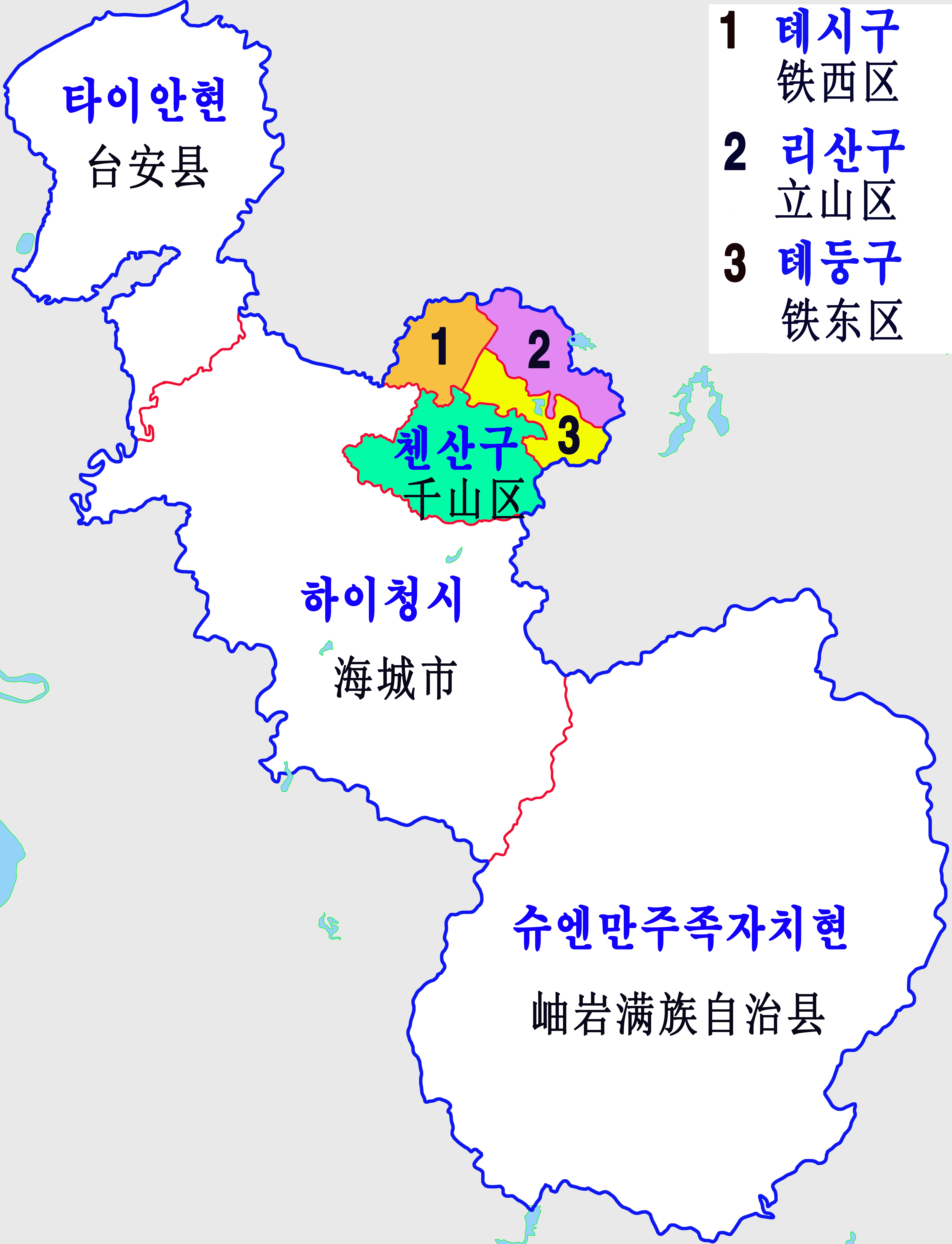 안산시지도